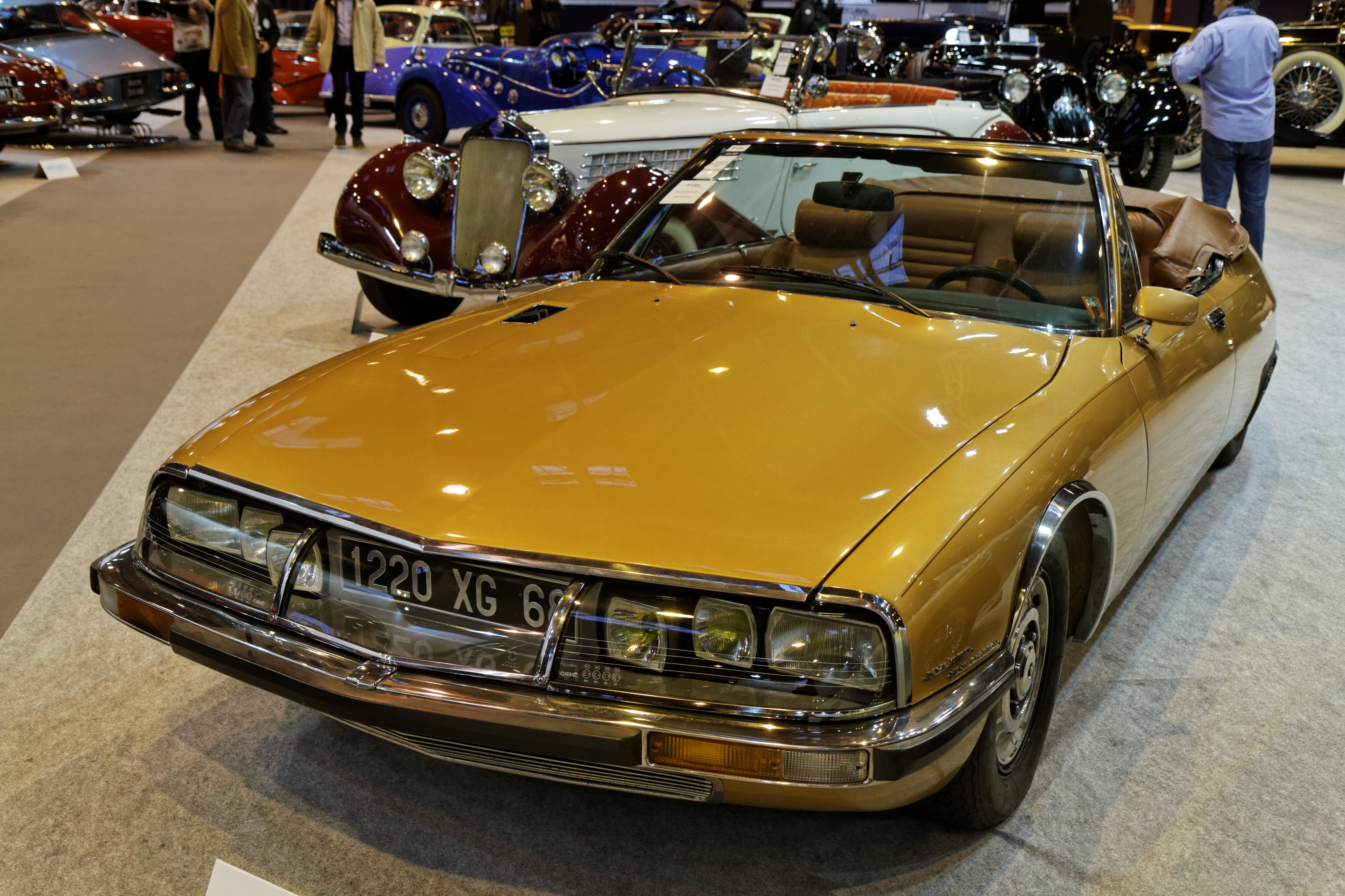 Une Citroën SM Mylord Cabriolet Chapron exposée lors du salon Retromobile 2014